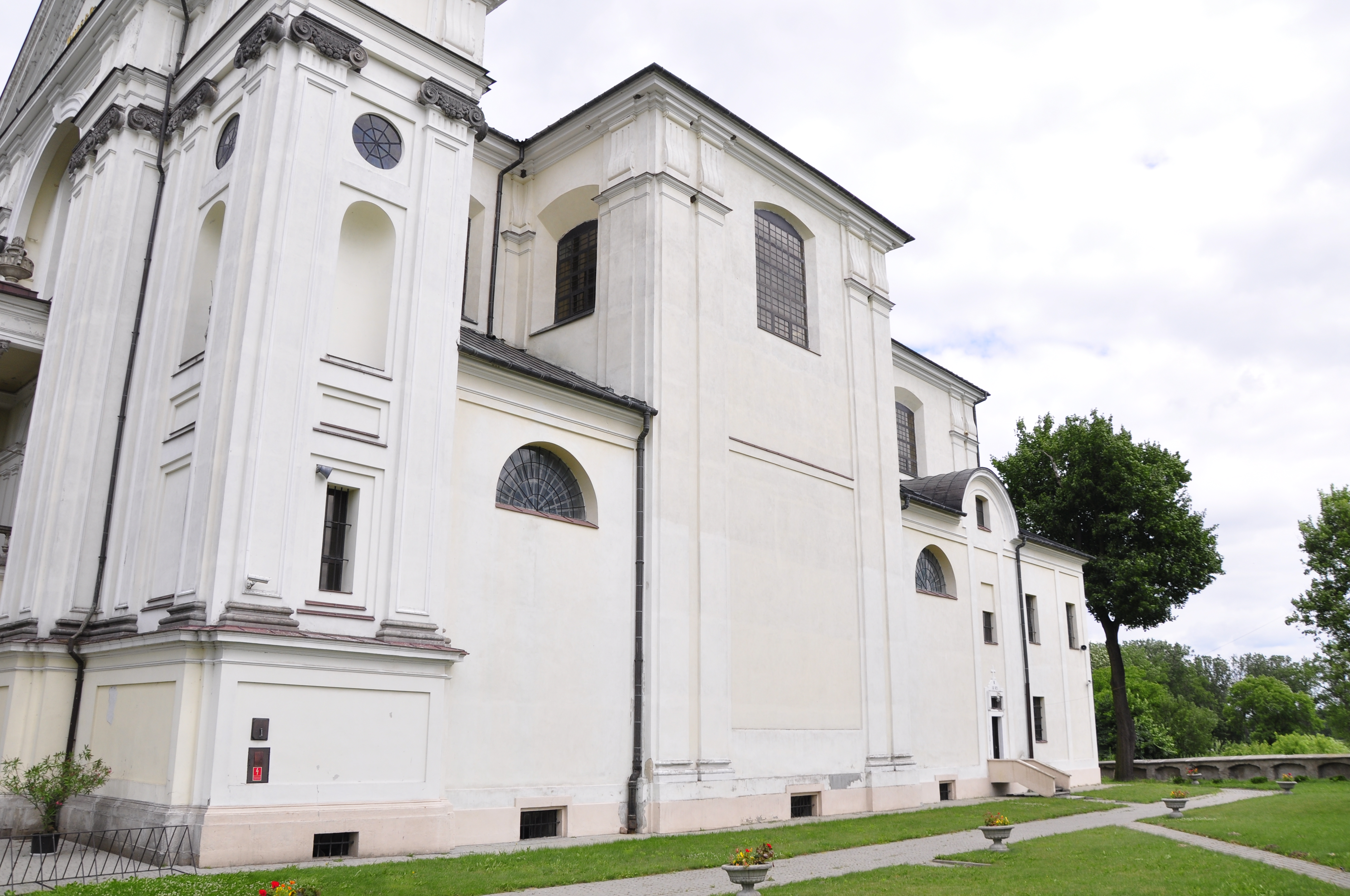 Church in Rokitno Błonie